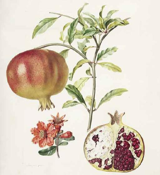 Grenadier à fruits doux (Pomegranate)